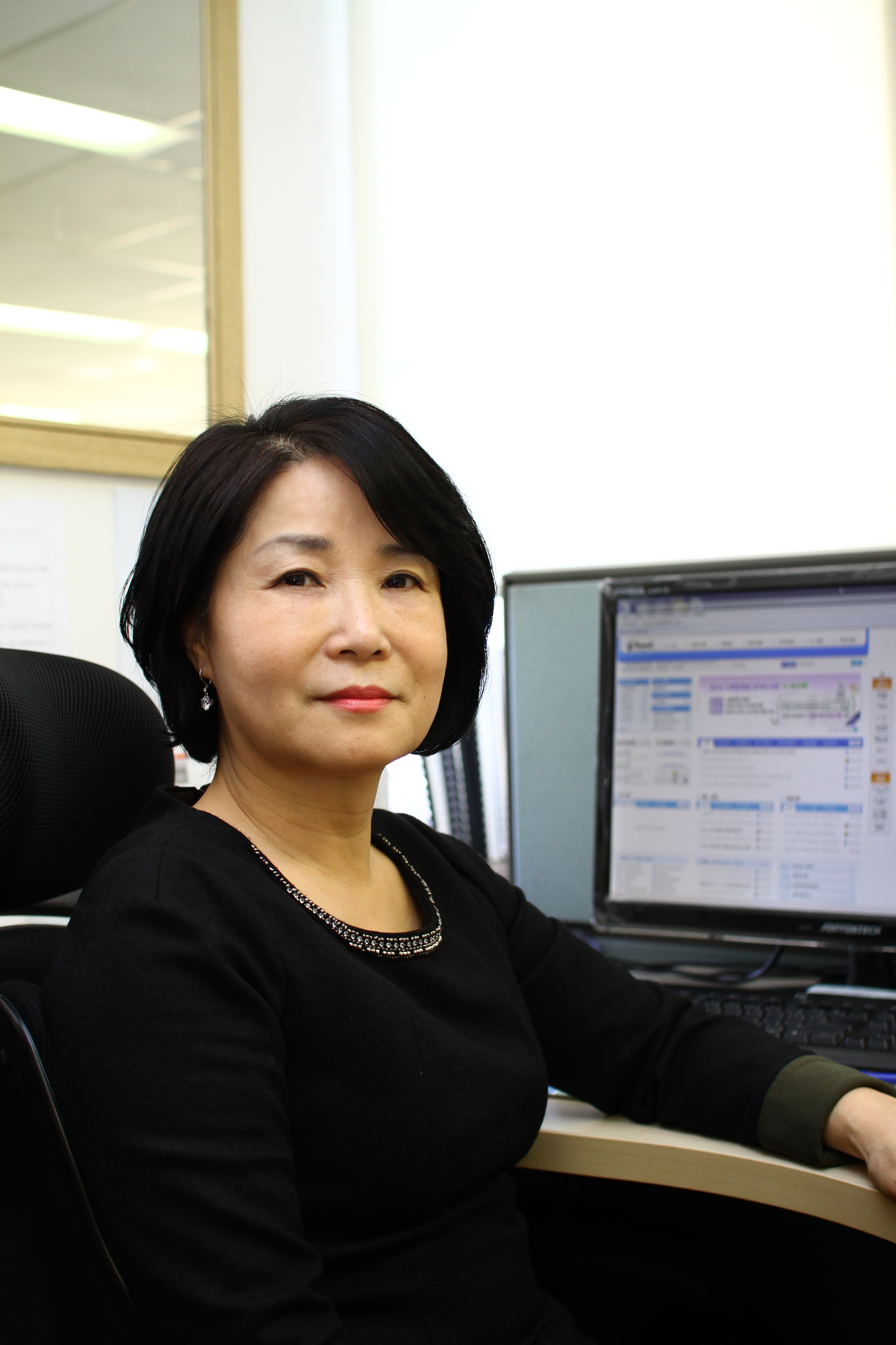 원미숙, 2014년 3월 횡성소방서장 원미숙 소방방재신문 인터뷰